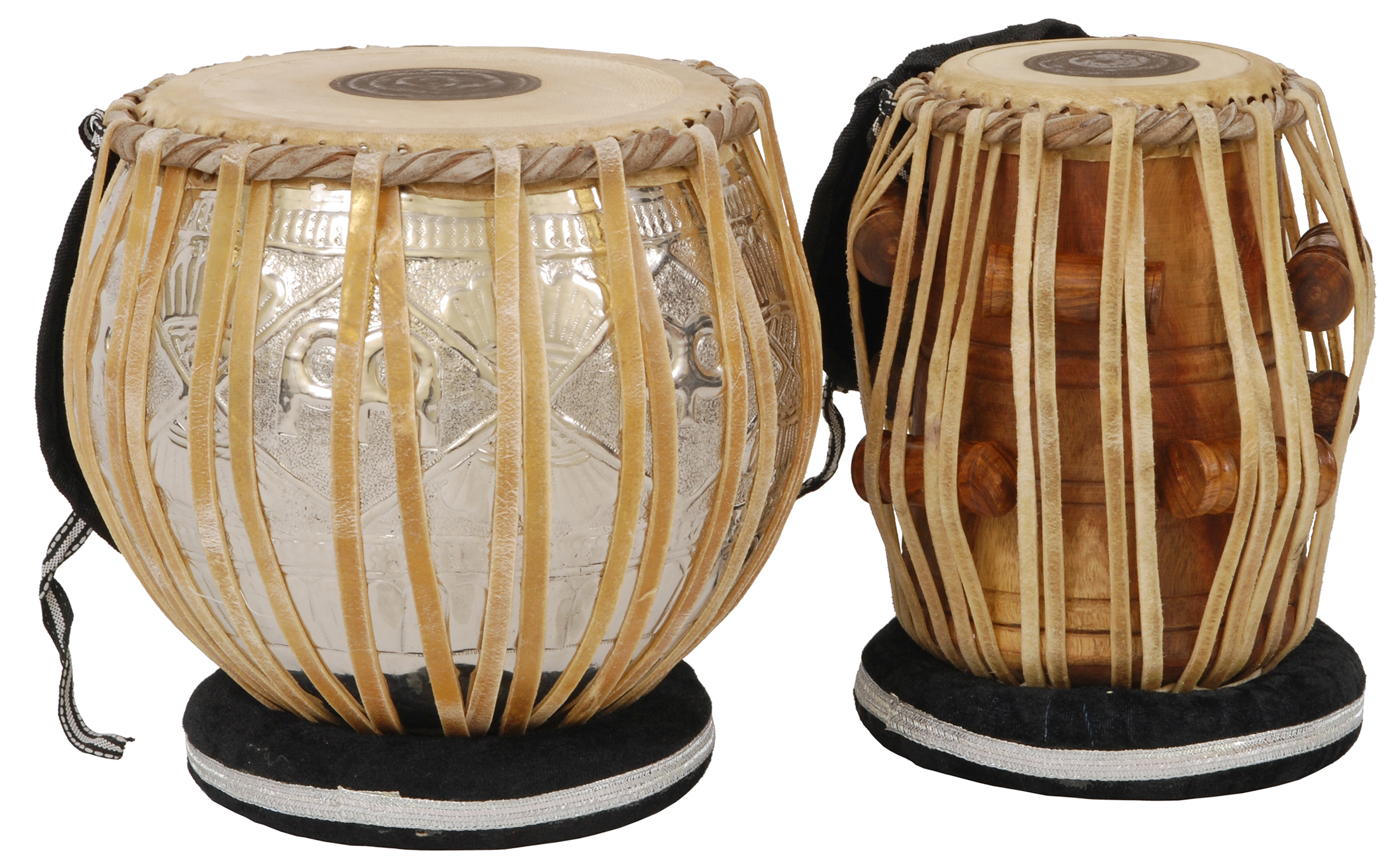 Instrument perkusyjny TABLA firmy Meinl